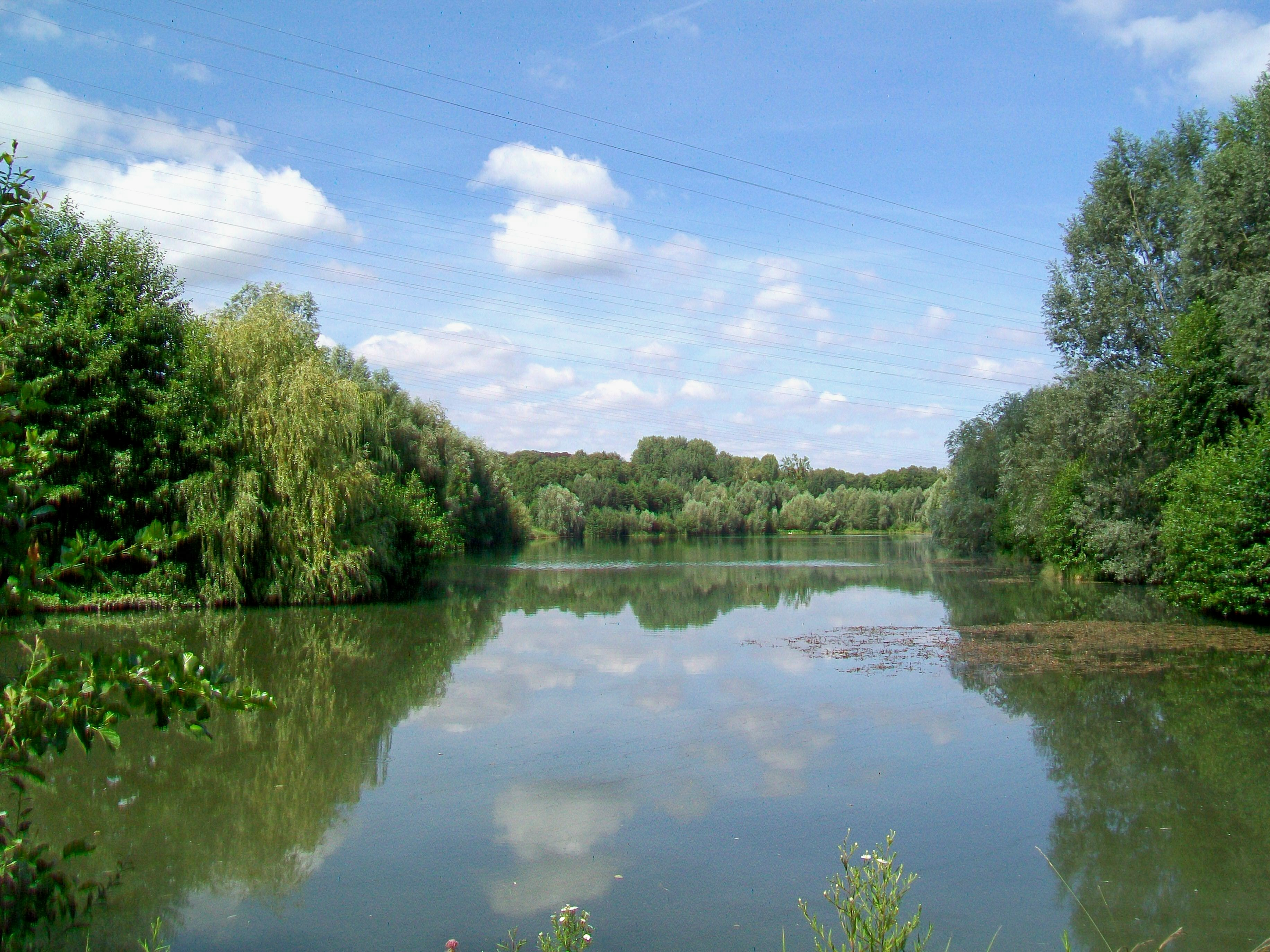 L'étang de Thiverny, près du chemin rural de Thiverny à Cramoisy. Malgré son appellation, l'étang se situe sur la commune de Montataire.